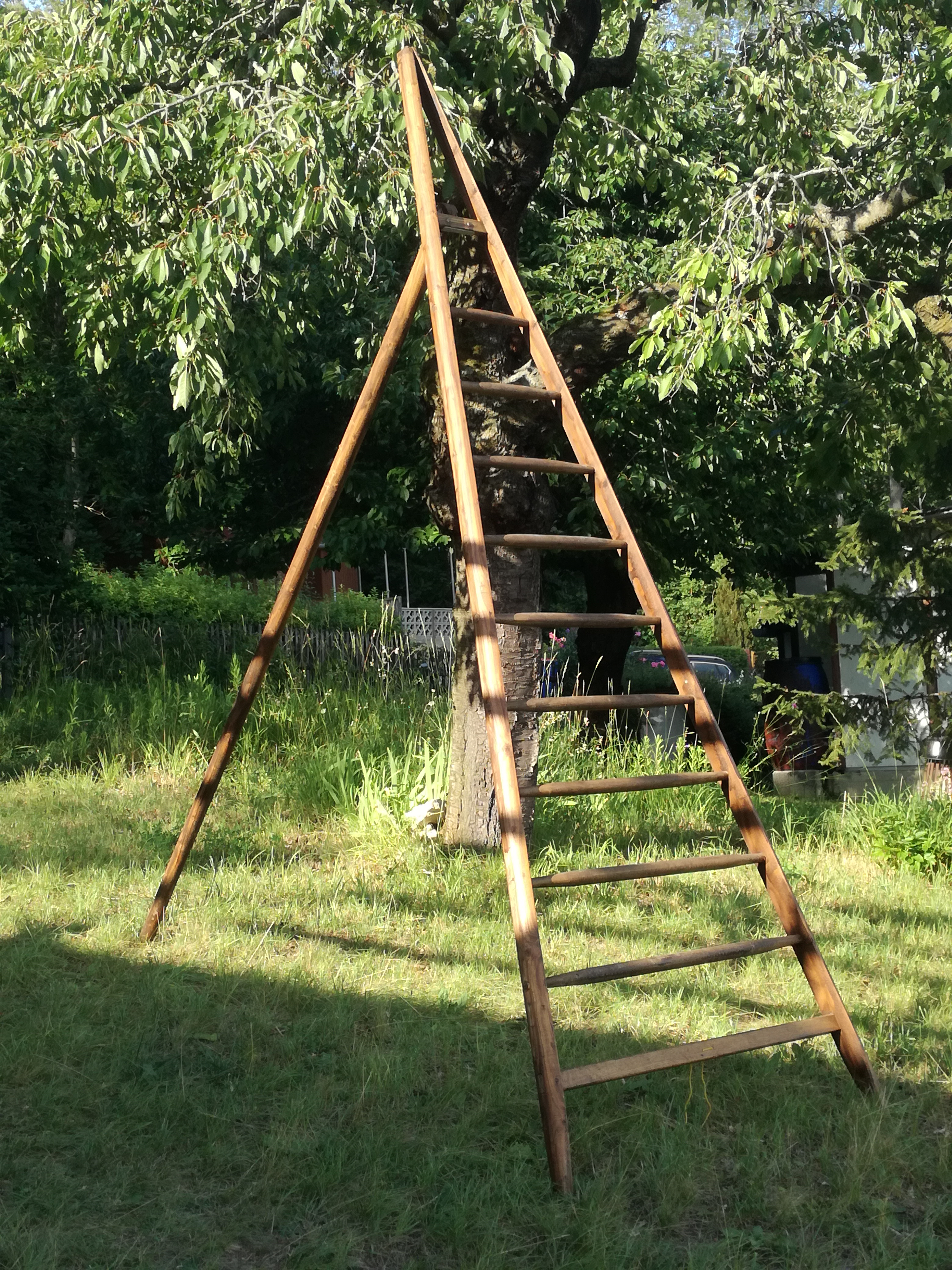 hölzerne Leiter, durch eine zusätzliche Stützze frei stehend